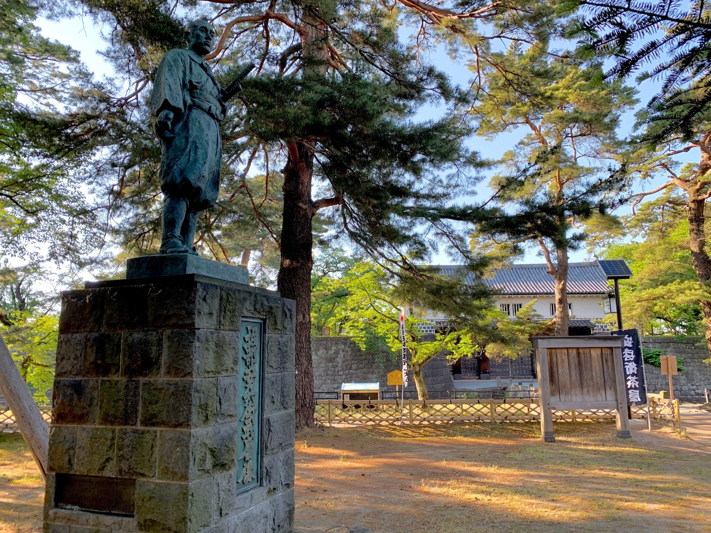 新発田城址公園の堀部安兵衛像（2020年5月）